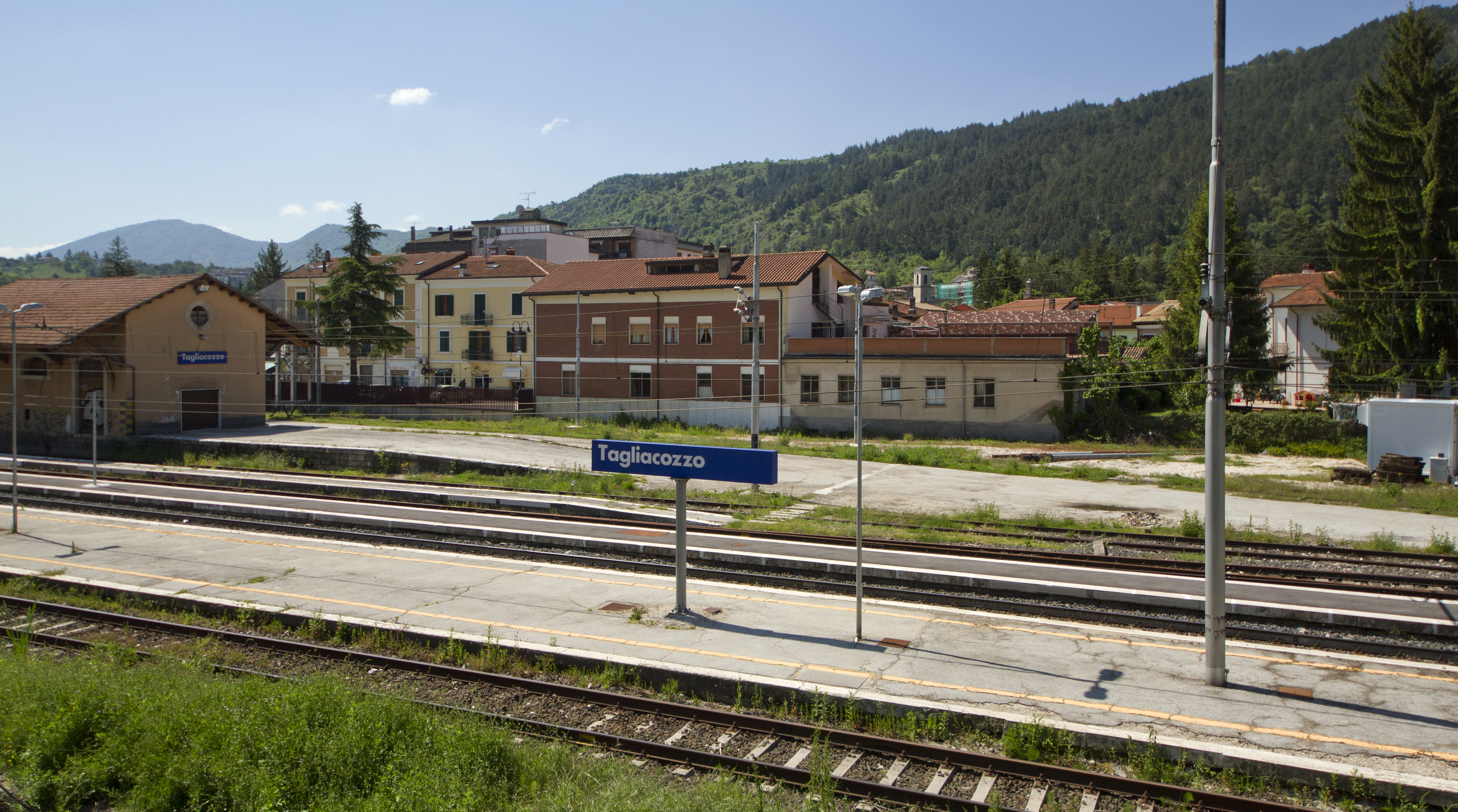 67069 Tagliacozzo AQ, Italy